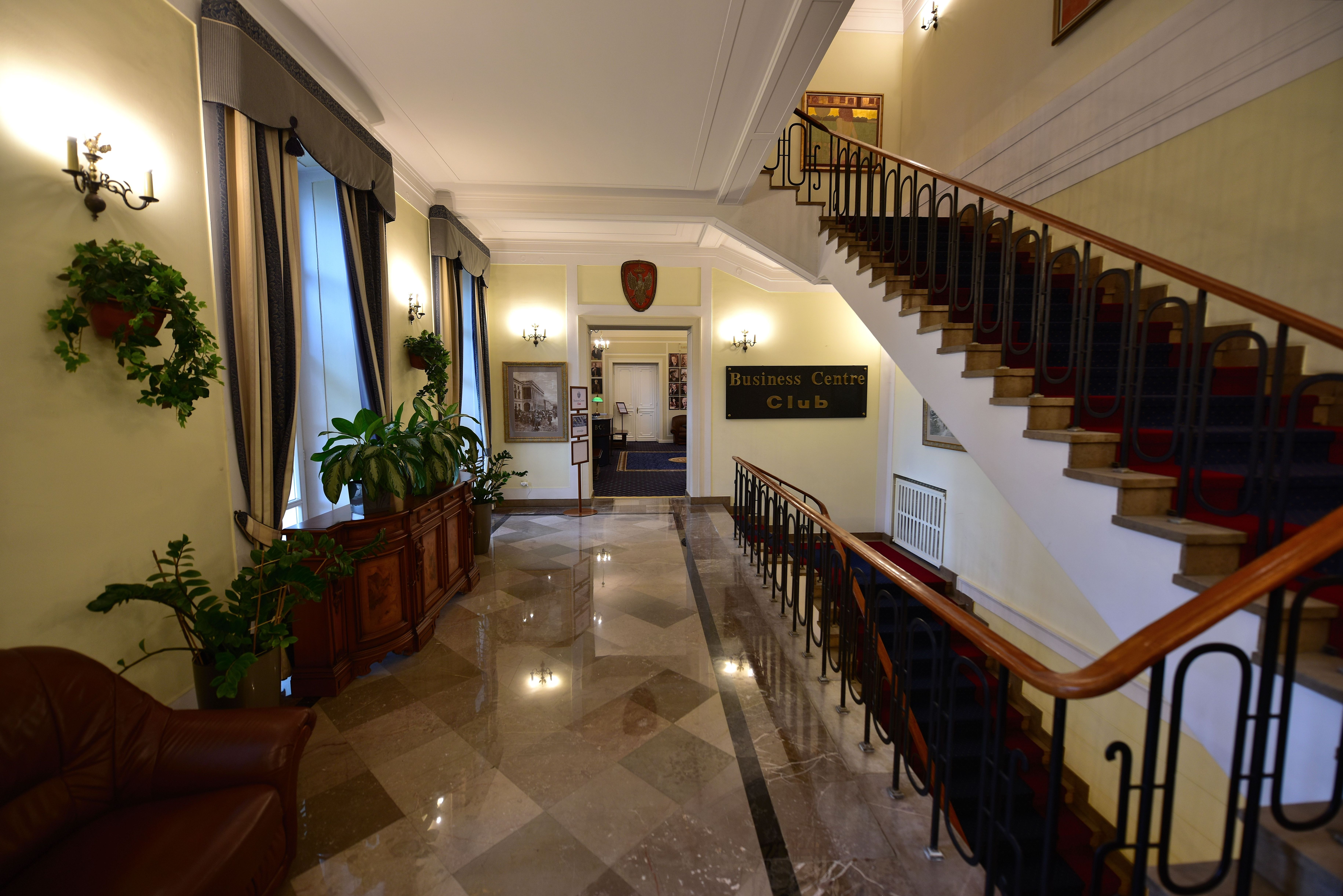 Pałac Lubomirskich przy placu Żelaznej Bramy w Warszawie